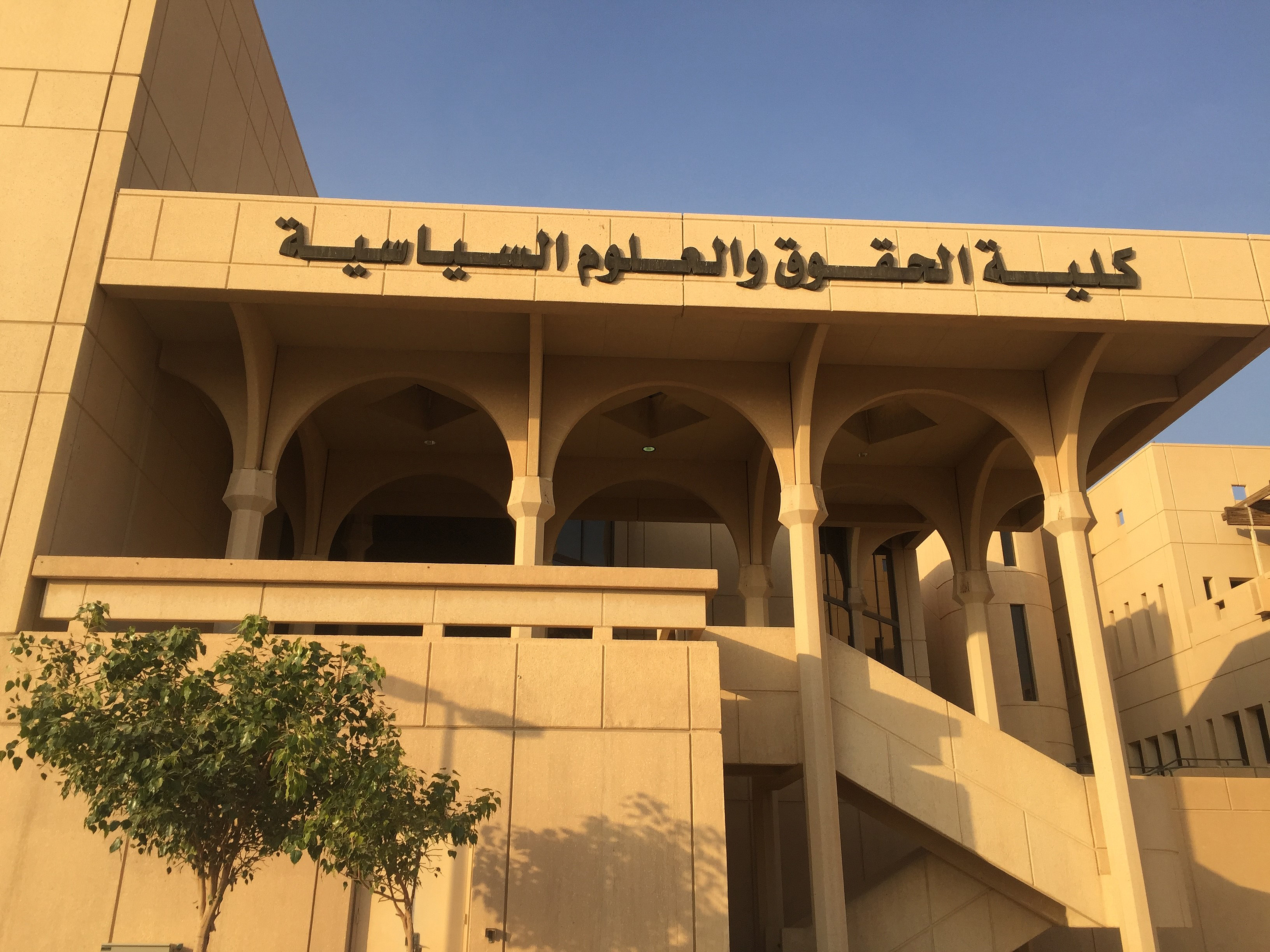 واجهة كلية الحقوق والعلوم السياسية في جامعة الملك سعود، من تصويري.